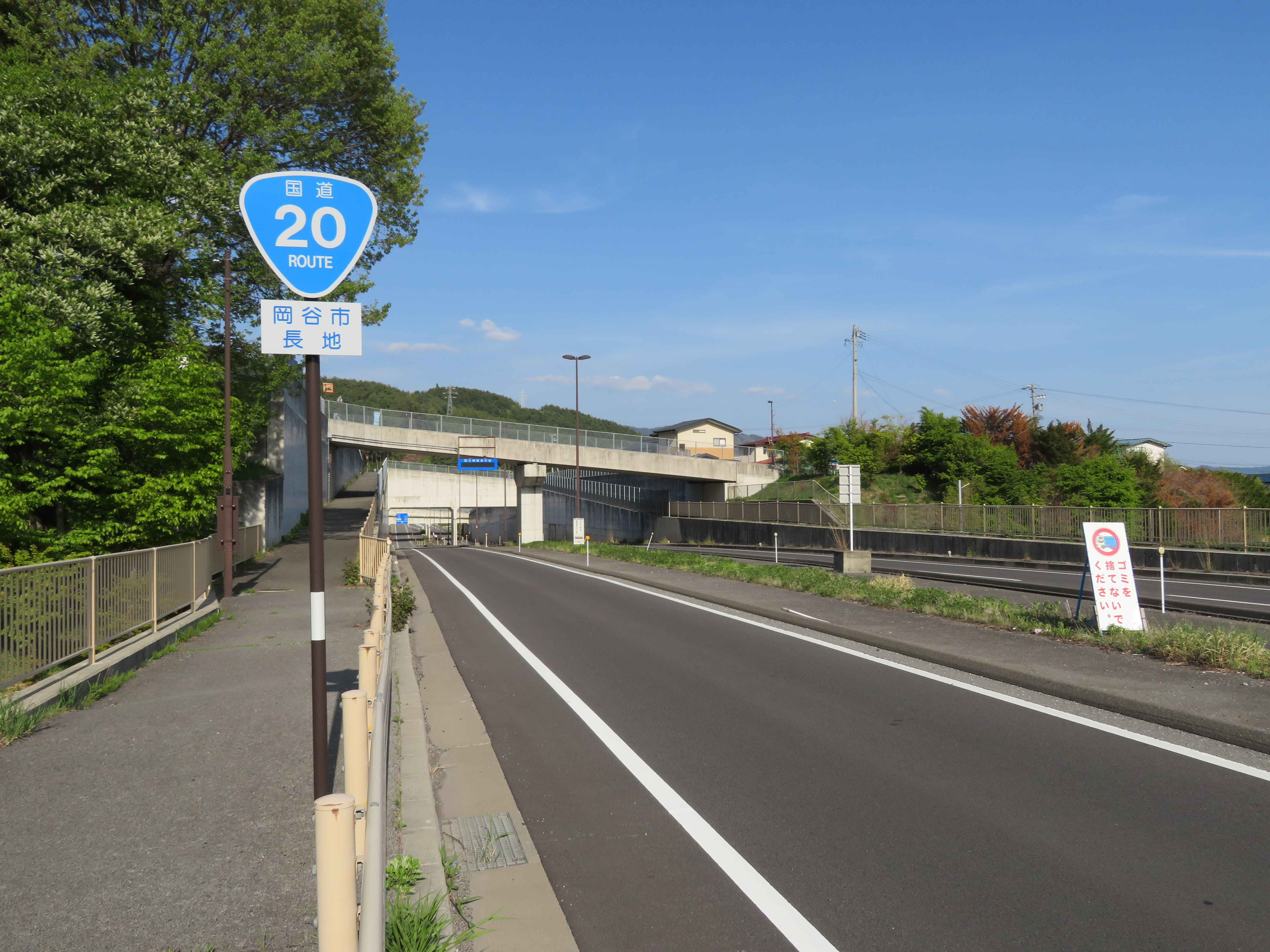 国道20号線諏訪バイパス長野県岡谷市長地付近（諏訪方面を撮影） Canon PowerShot SX720 HS